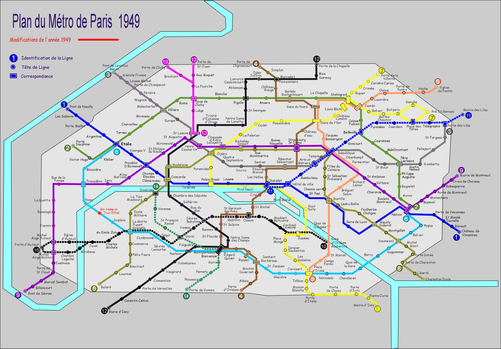 Plan metro Paris 1949